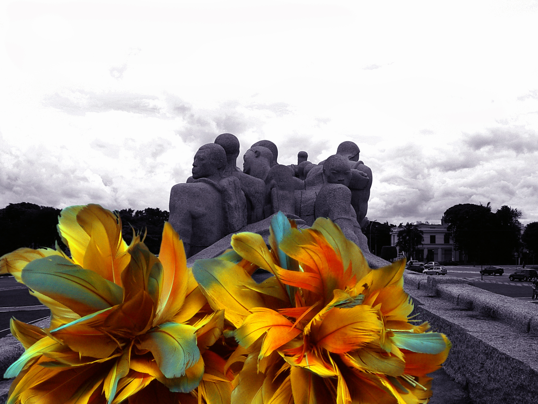 Monumento as Bandeiras, angulo sobre o barco. Requiem aos Indios sacrificados na caminhada dos Bandeirantes... Adereço Indígena do Museu de Arqueologia e Etnologia da U.S.P. Referencia Enciclopédia Itaú Cultural